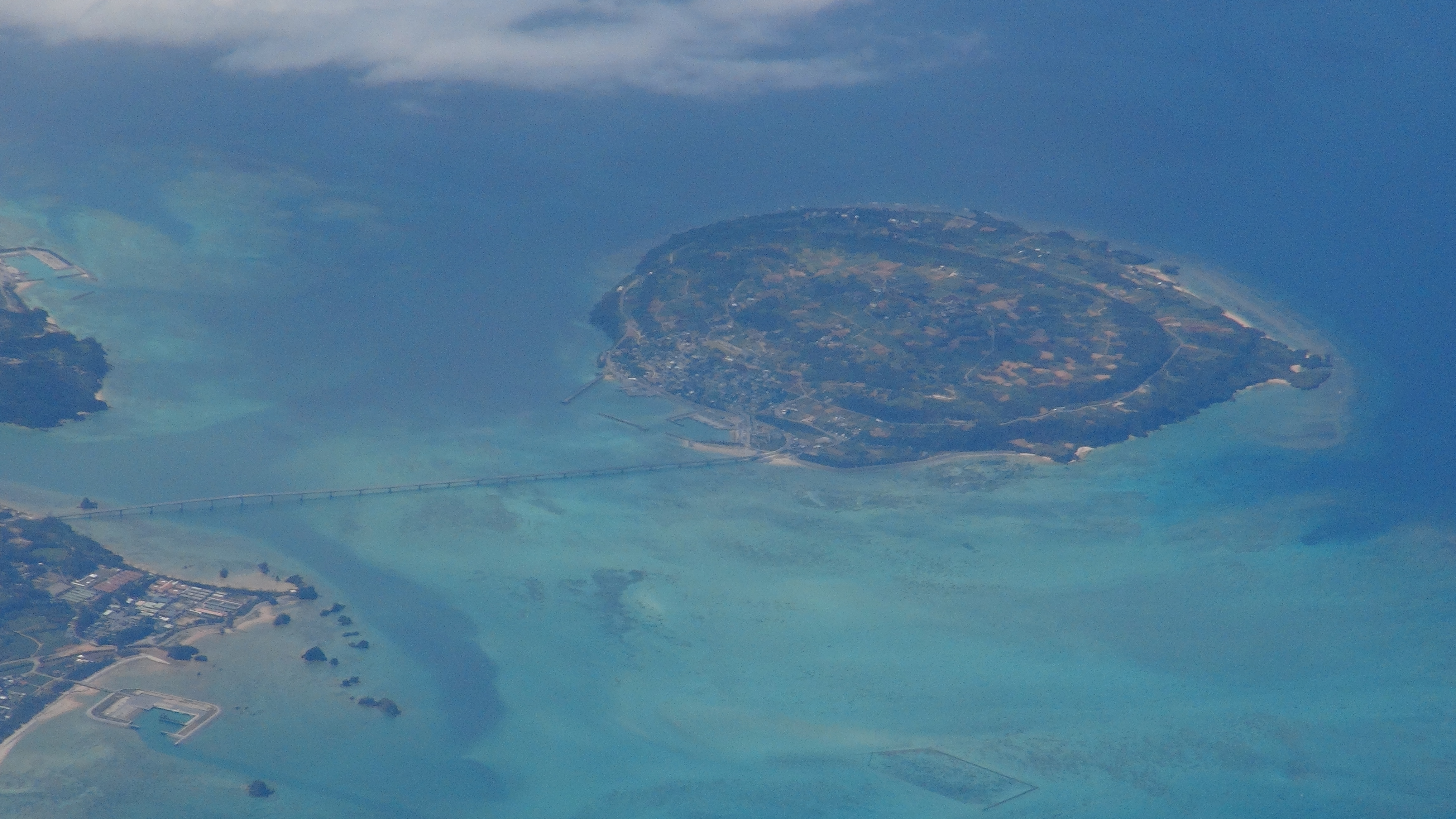 古宇利島（上空から）